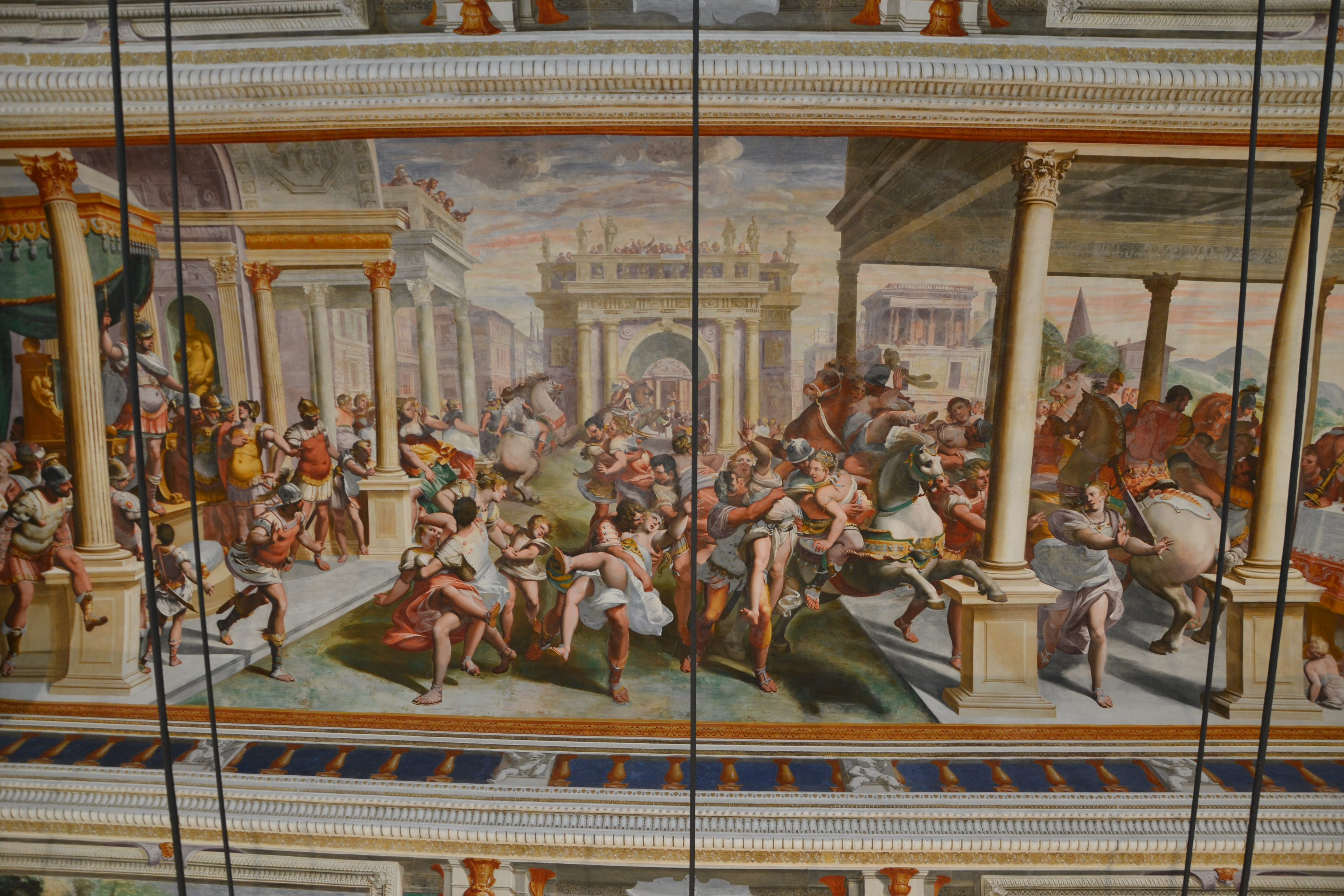 Villa Imperiale di Terralba (Genoa) - “Ratto delle Sabine” del pittore genovese Luca Cambiaso (1527-1585)